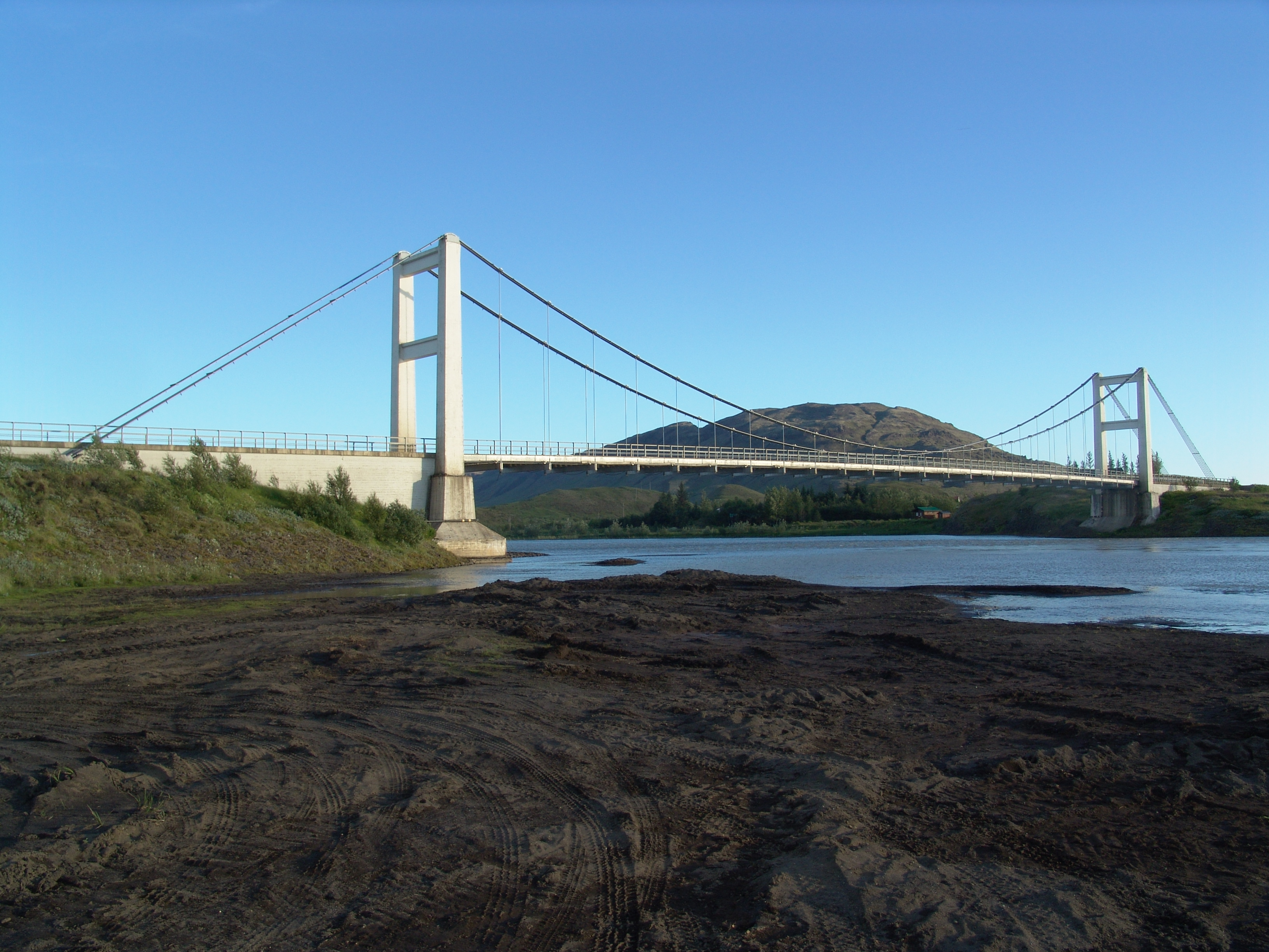 Brücke.